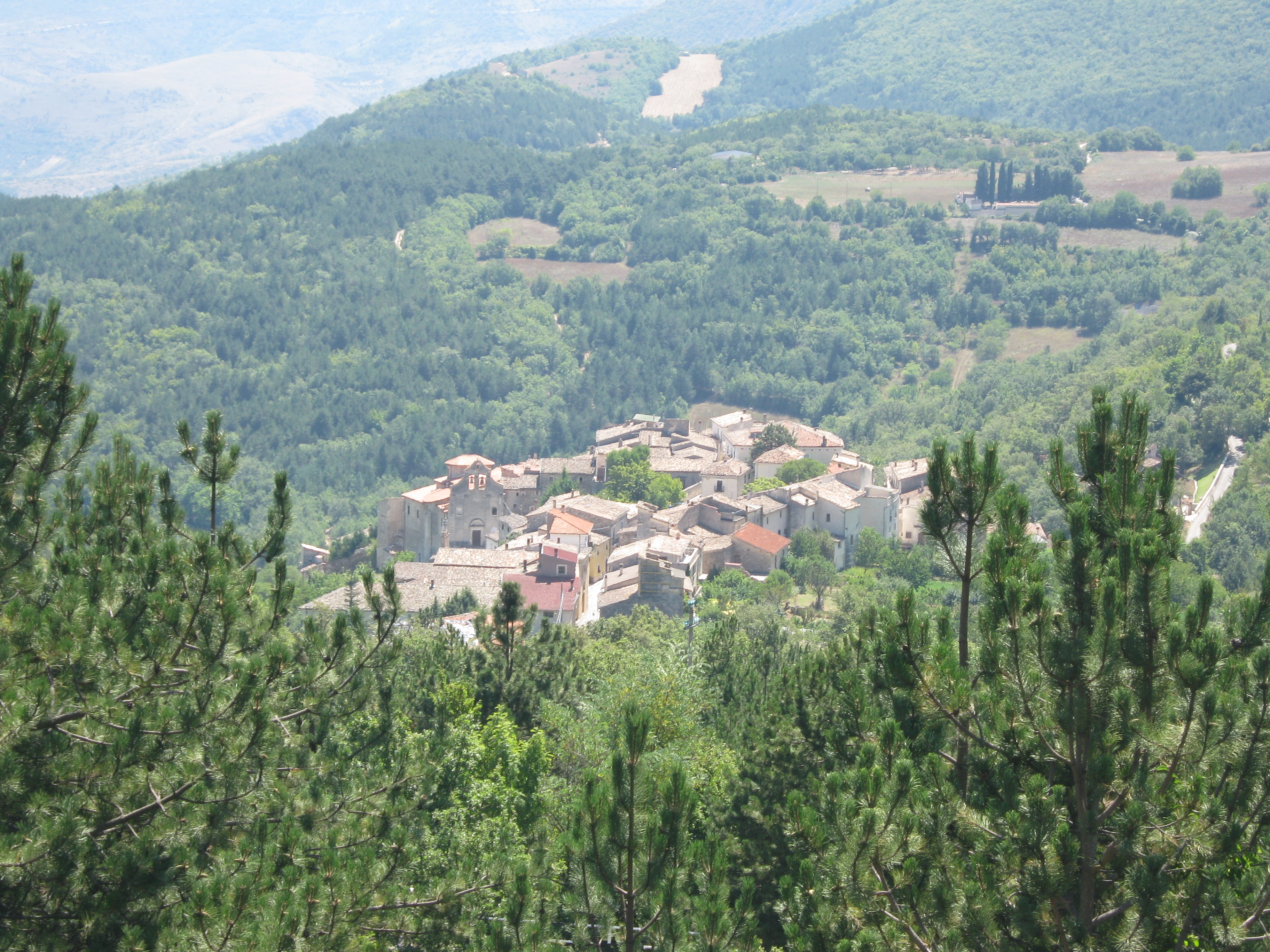 Panorama di Carapelle Calvisio (L'Aquila)